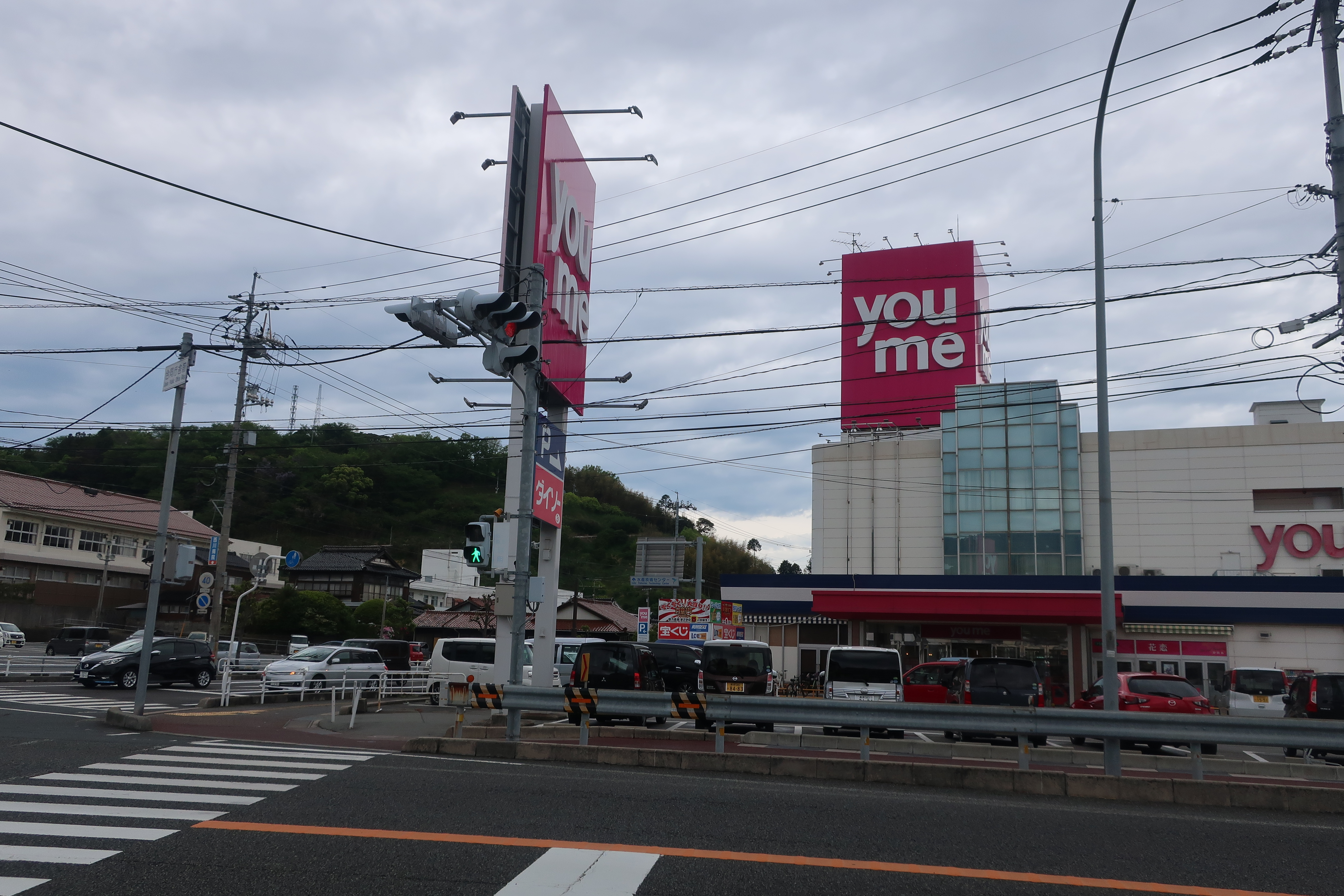 ゆめタウン浜田の全景